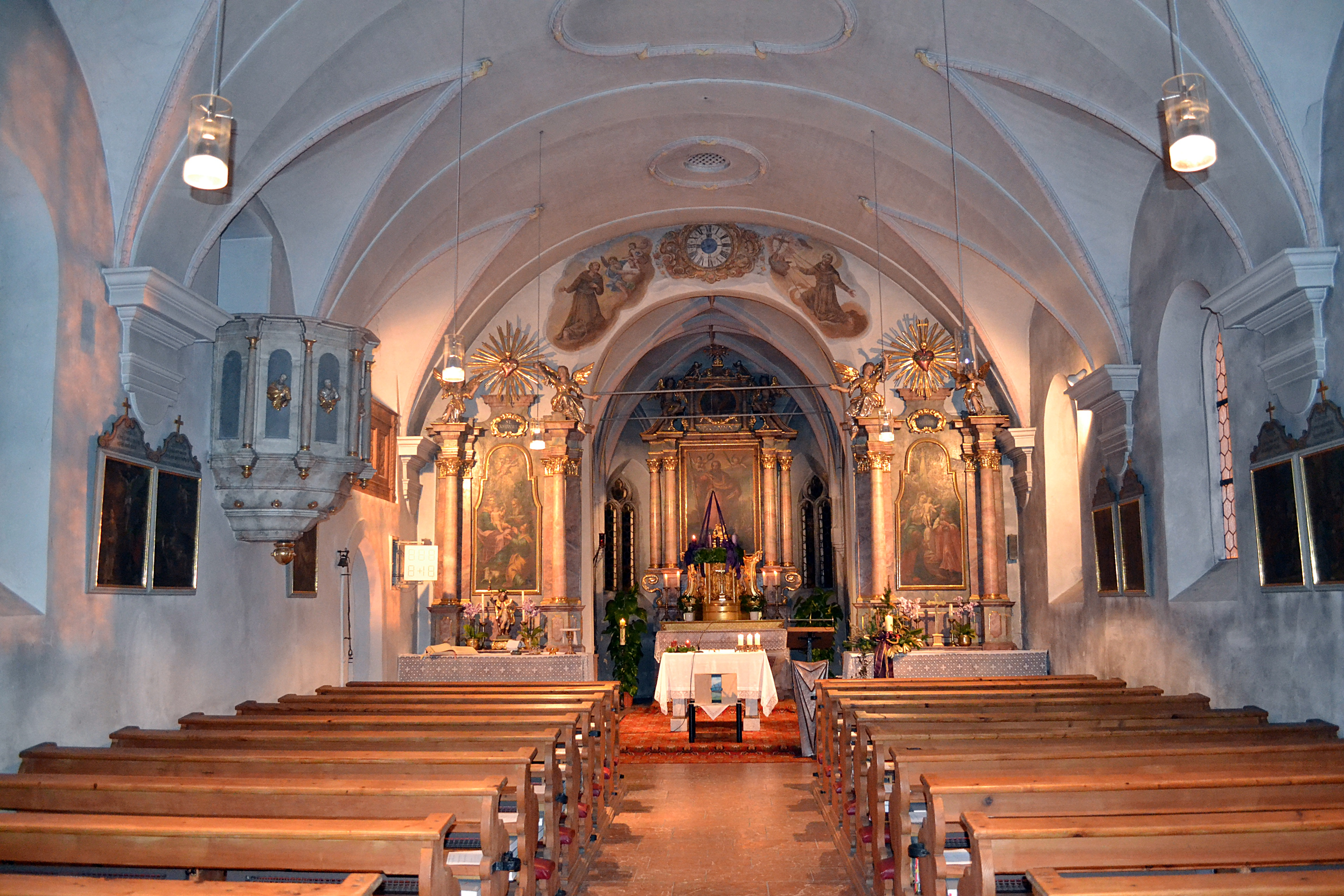 Innenansicht St. Jakob Wallgau im Advent Weihnachten